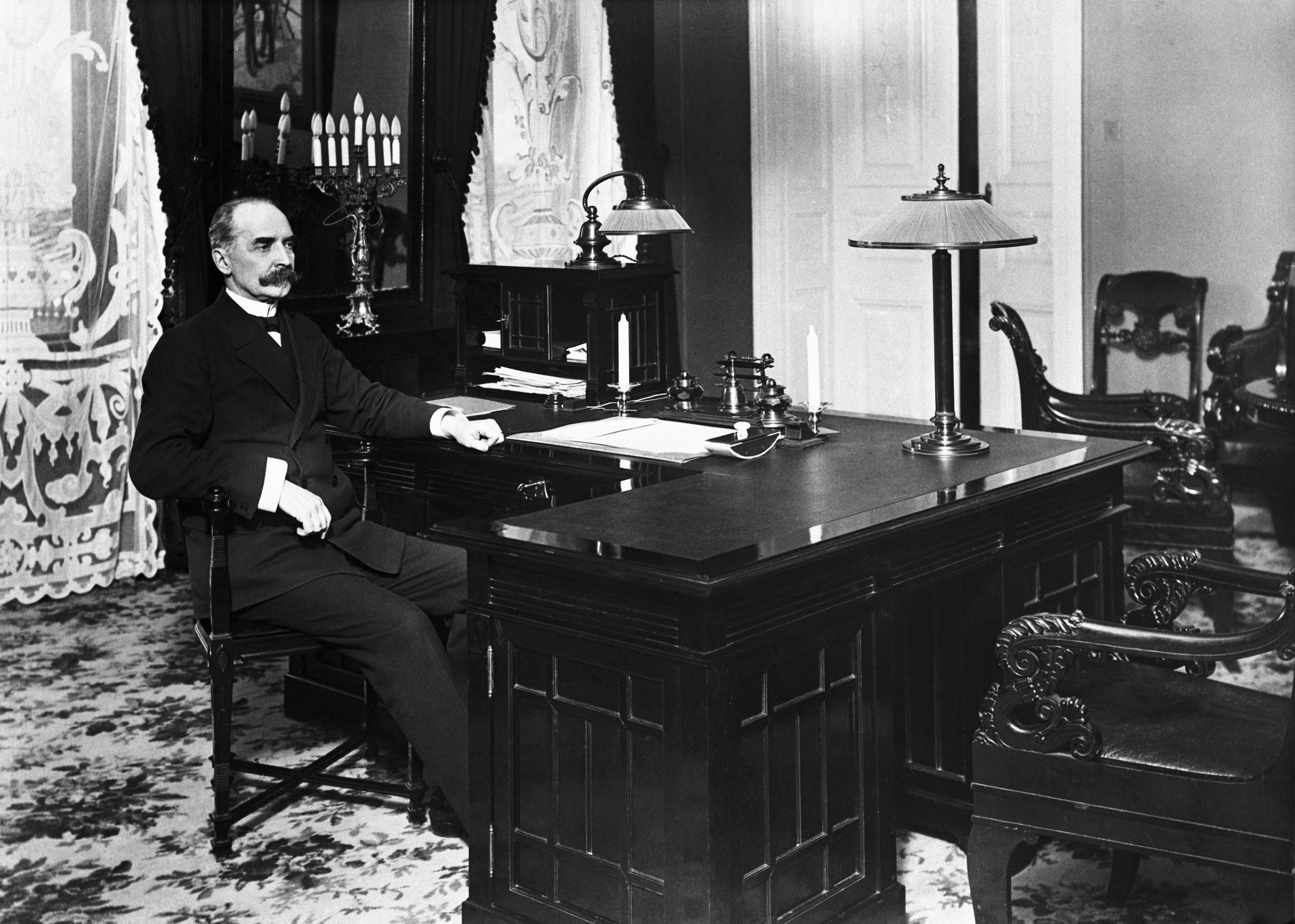 Tasavallan presidentti Kaarlo Juho Ståhlberg työpöytänsä ääressä presidentinlinnassa.